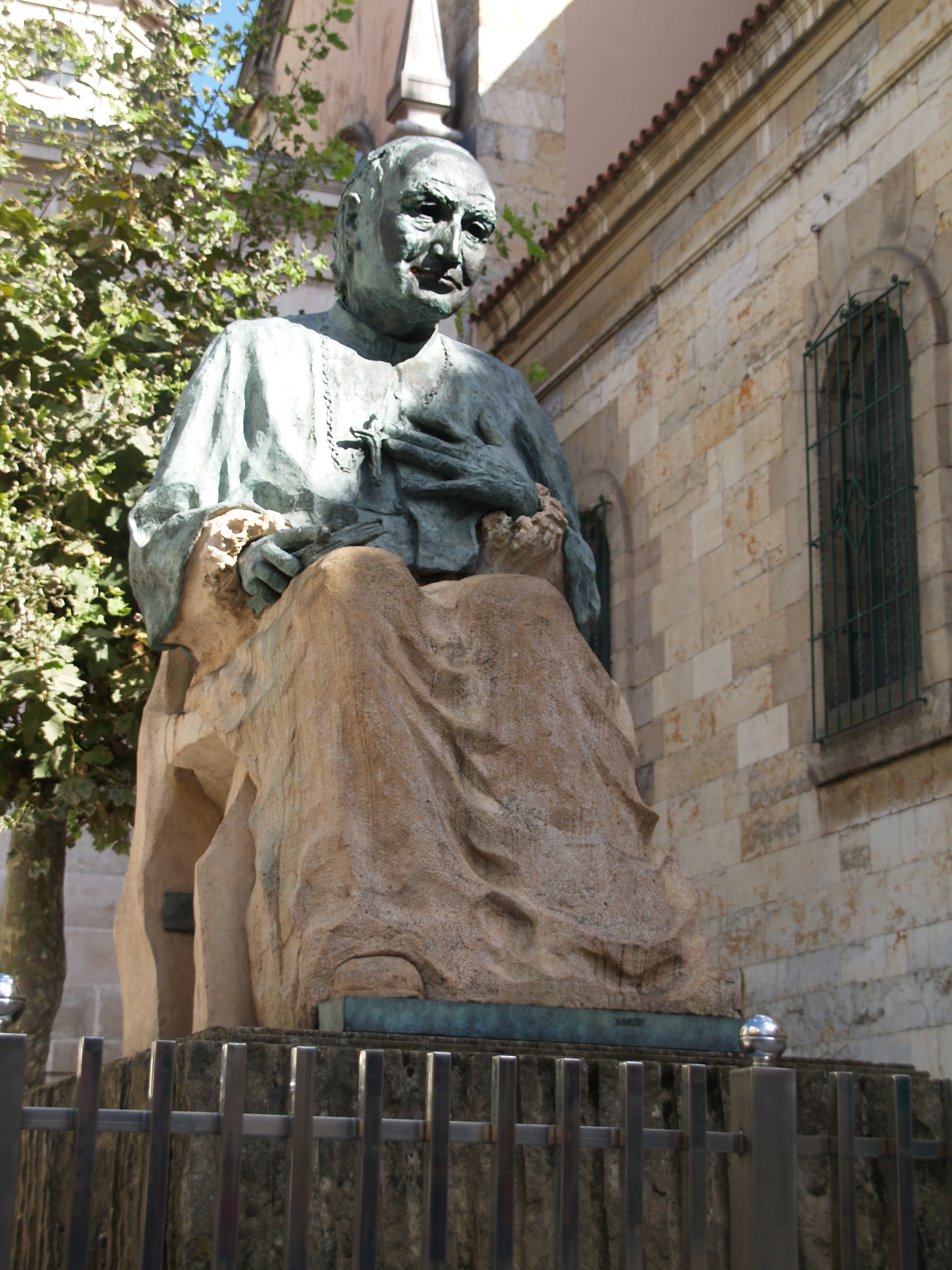 Es una estatua de un cura, situada en los aledaños de la "Iglesia de Santa Lucía".